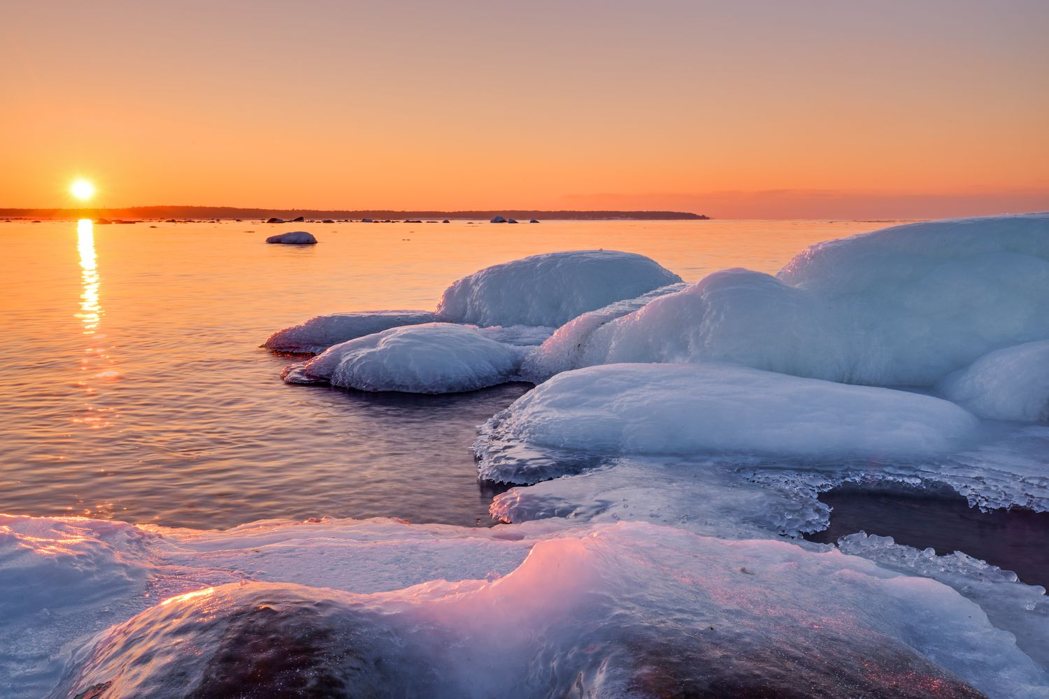 Vaade talvisele Lohusalu lahele päikeseloojangu ajal, vastaskaldal asub Lohusalu sadam. Pilt on tehtud Laulasmaa maastikukaitsealalt